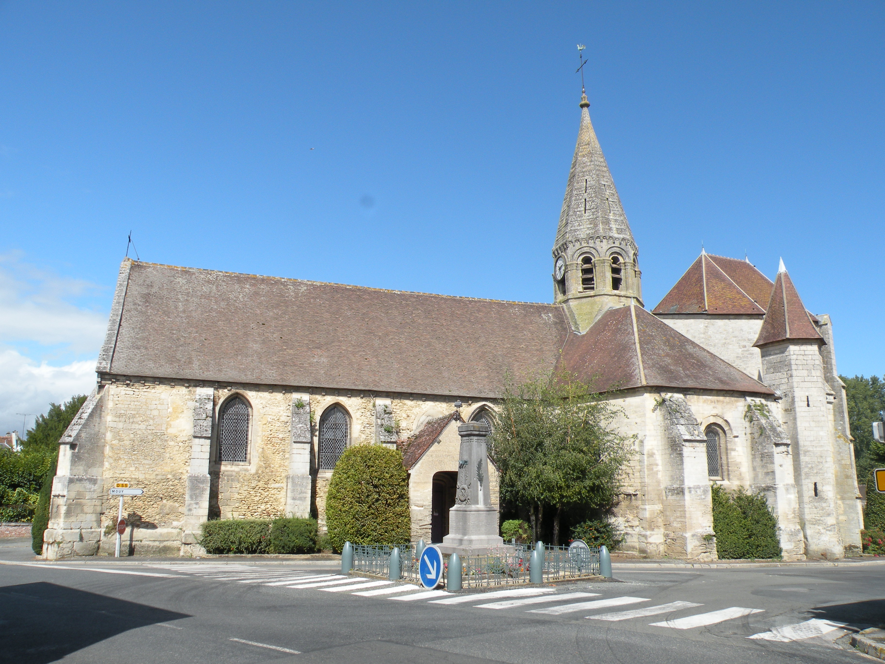 eglise de Cauvigny